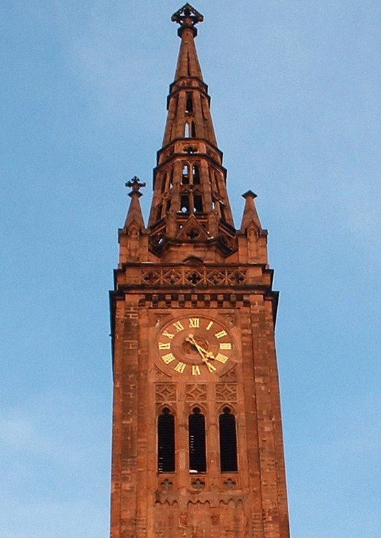 Detail des Lutherkirchturms in Ludwigshafen